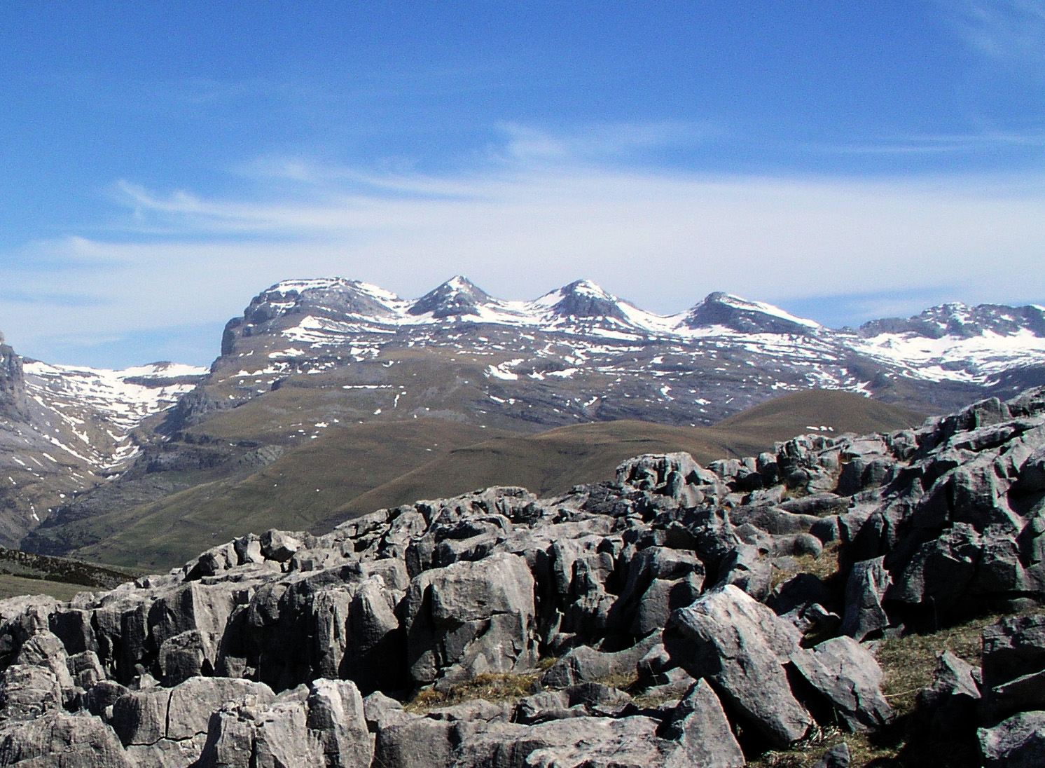 Lapiza en una ladera del Pico Mondoto, Añisclo (Huesca)